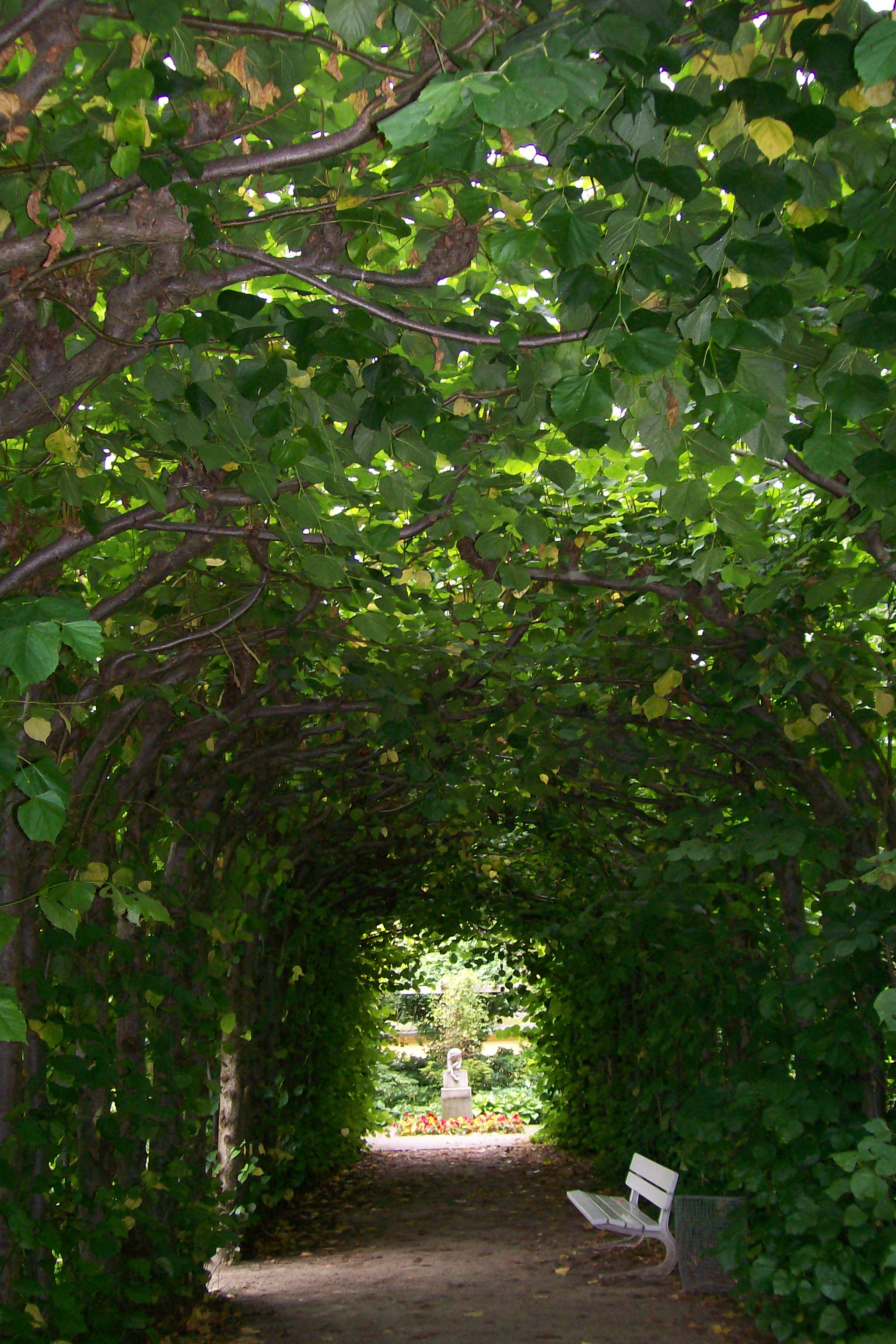 Schulgarten Lübeck in Lübeck, Germany, Laubengang